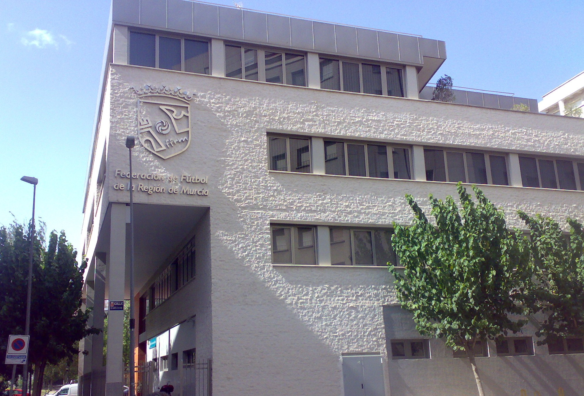 Sede en Murcia de la Federación de Fútbol de la Región de Murcia.